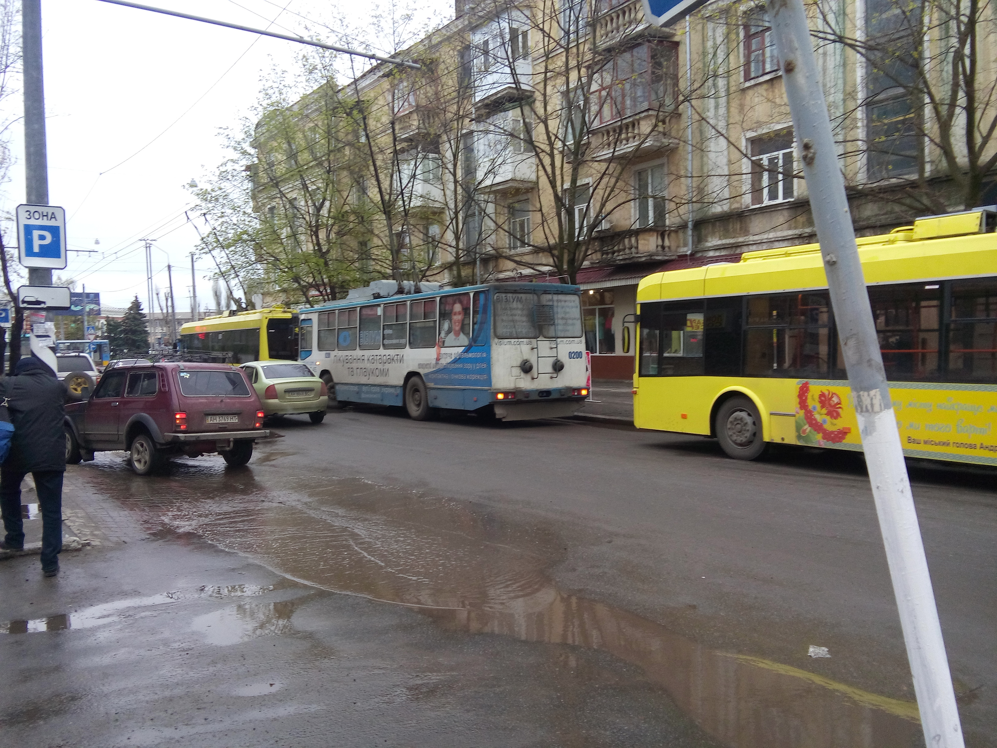 троллейбус